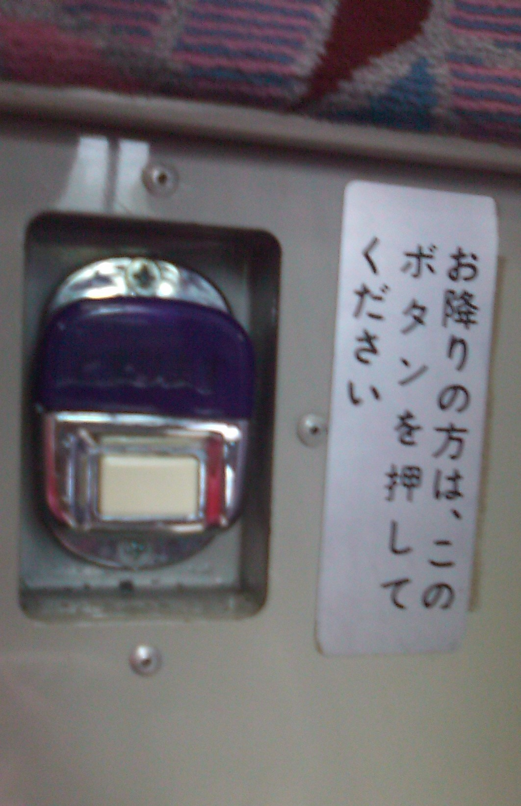 降車ボタン